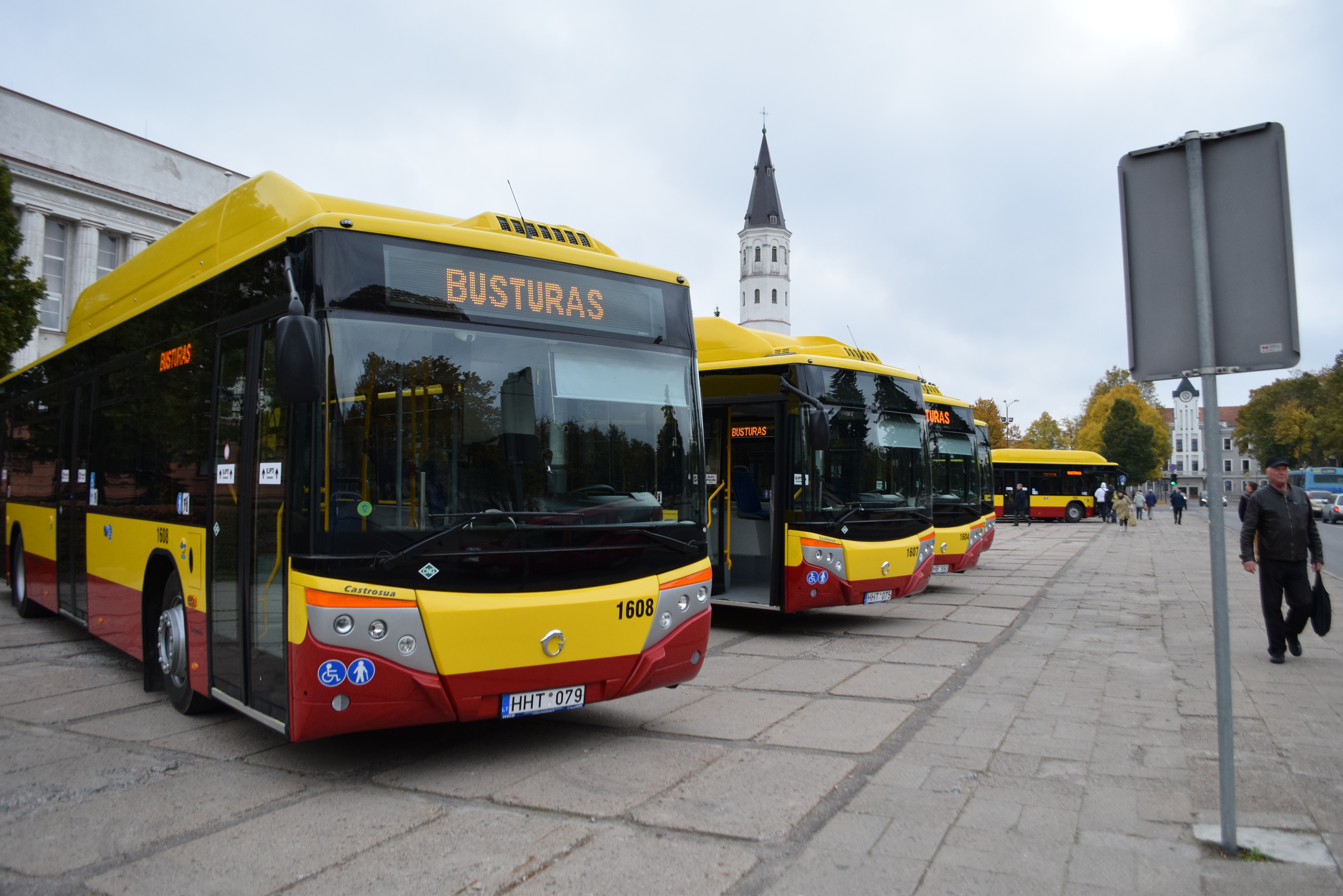 Naujųjų "Castrosúa City Versus CNG" autobusų pristatymas Prisikėlimo aikštėje. Luko Aluzo nuotrauka. 2014 m. spalio 6 d.